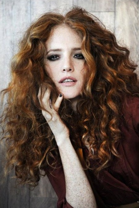 מעין קרת